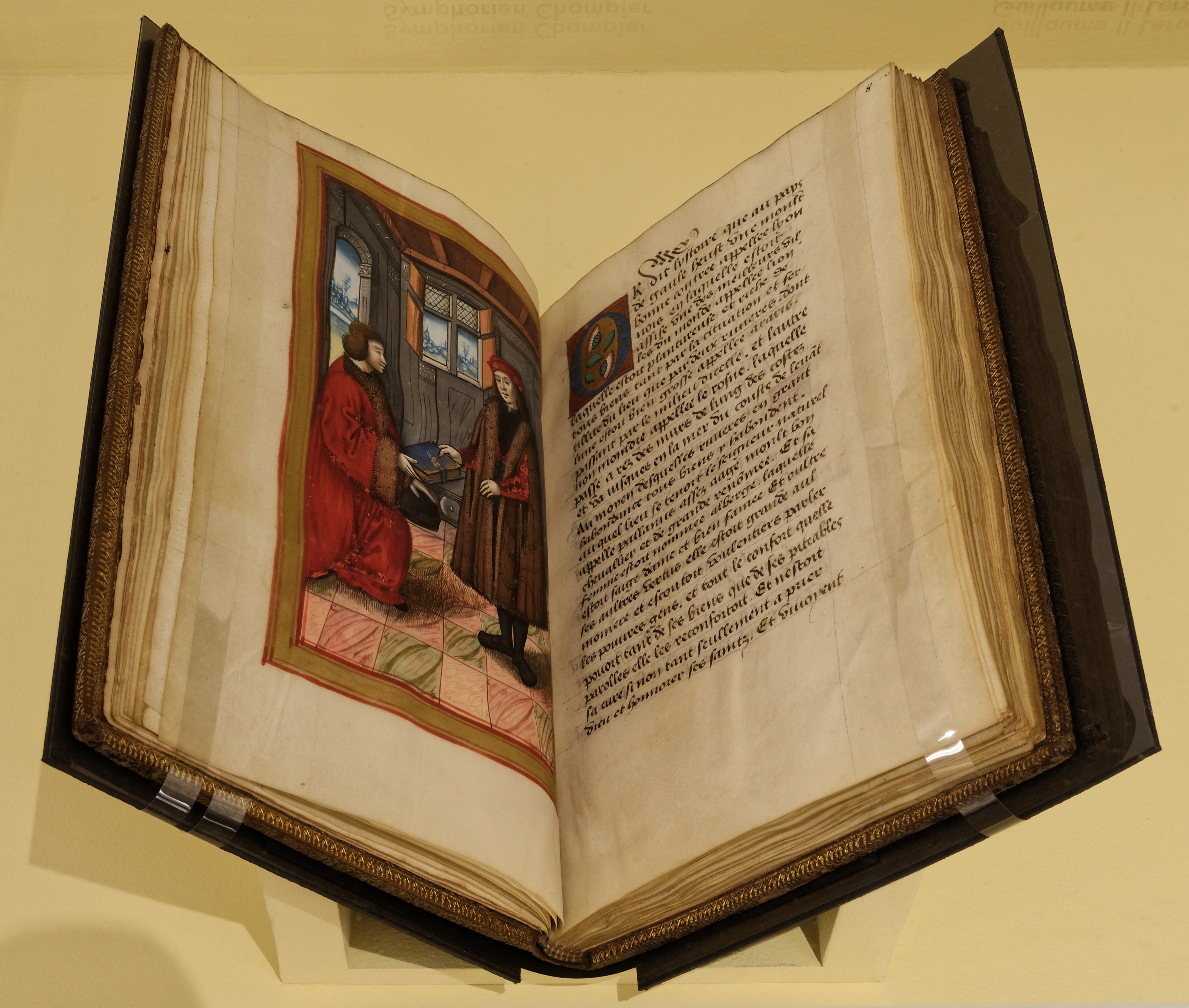 Exposition Lyon Renaissance. Arts et humanisme. Catalogue fig 82, p. 219 : enluminure de Guillaume II Le Roy, folio 7verso, montrant une scène de présentation, dans L'origine et l'antiquité de la cite de Lion de Symphorien Champier. Paris BNF